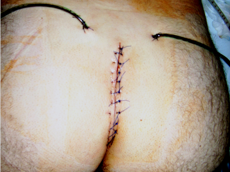 Primaerer Wundverschluss